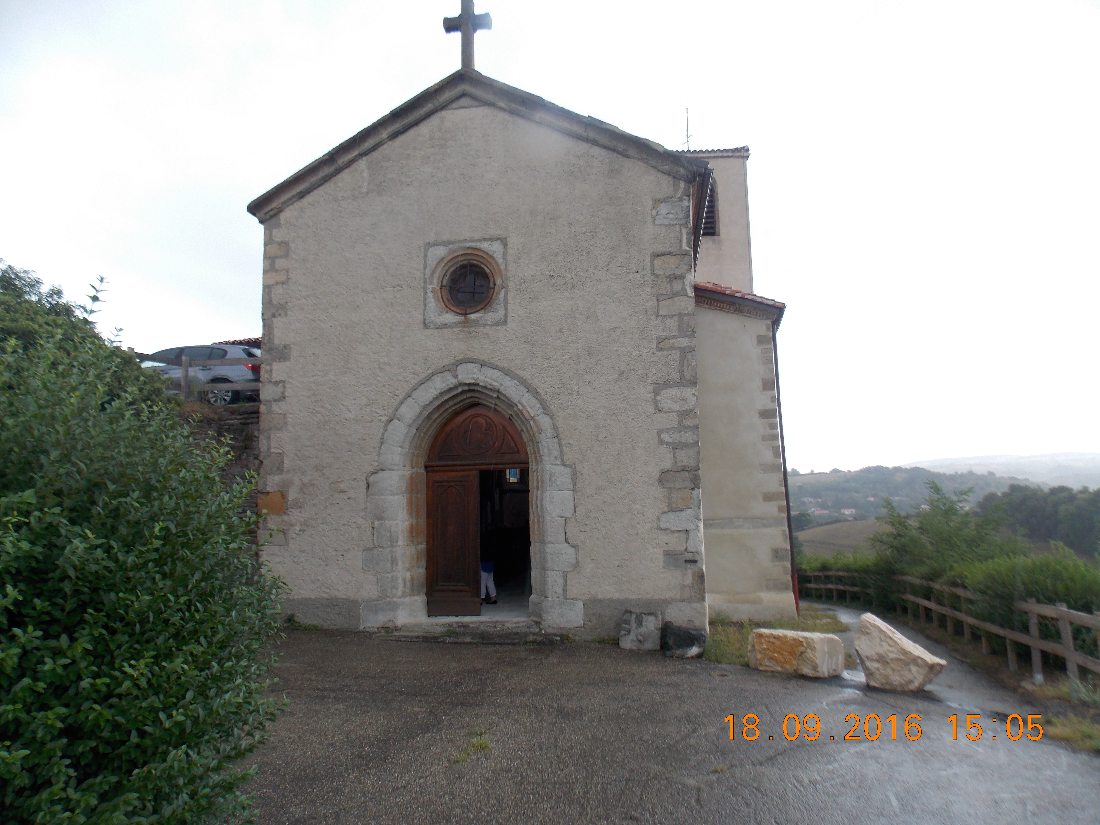 Église de Dargoire (Loire, France), du XVIe siècle.